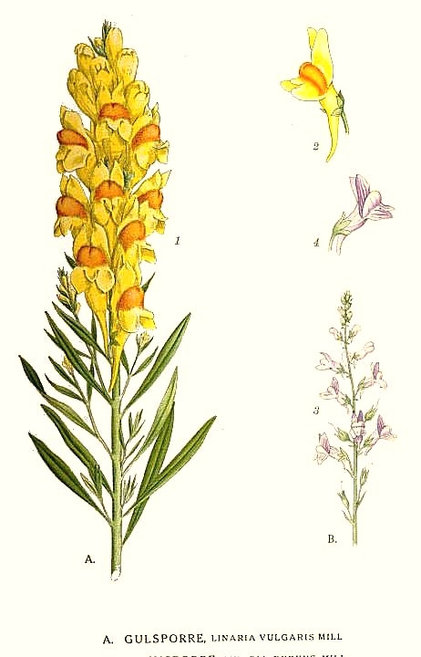 Linaria vulgaris Mill., Linaria repens (L.) Mill. Original Description A. Gulsporre, Linaria vulgaris Mill. B. Strimsporre, Linaria repens L.